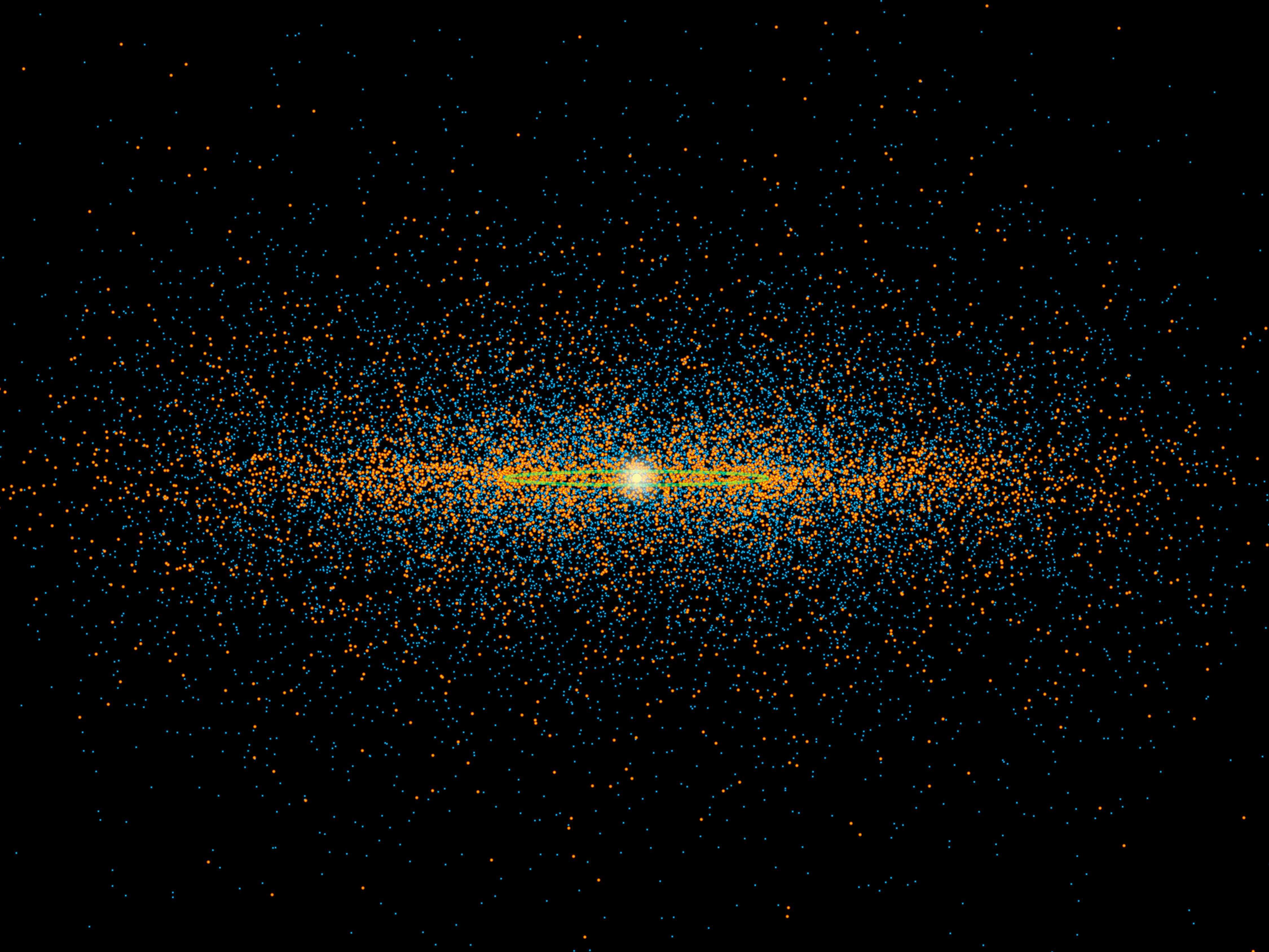 Symulowany rozkład przestrzenny planetoid bliskich Ziemi oraz potencjalnie niebezpiecznych asteroid.